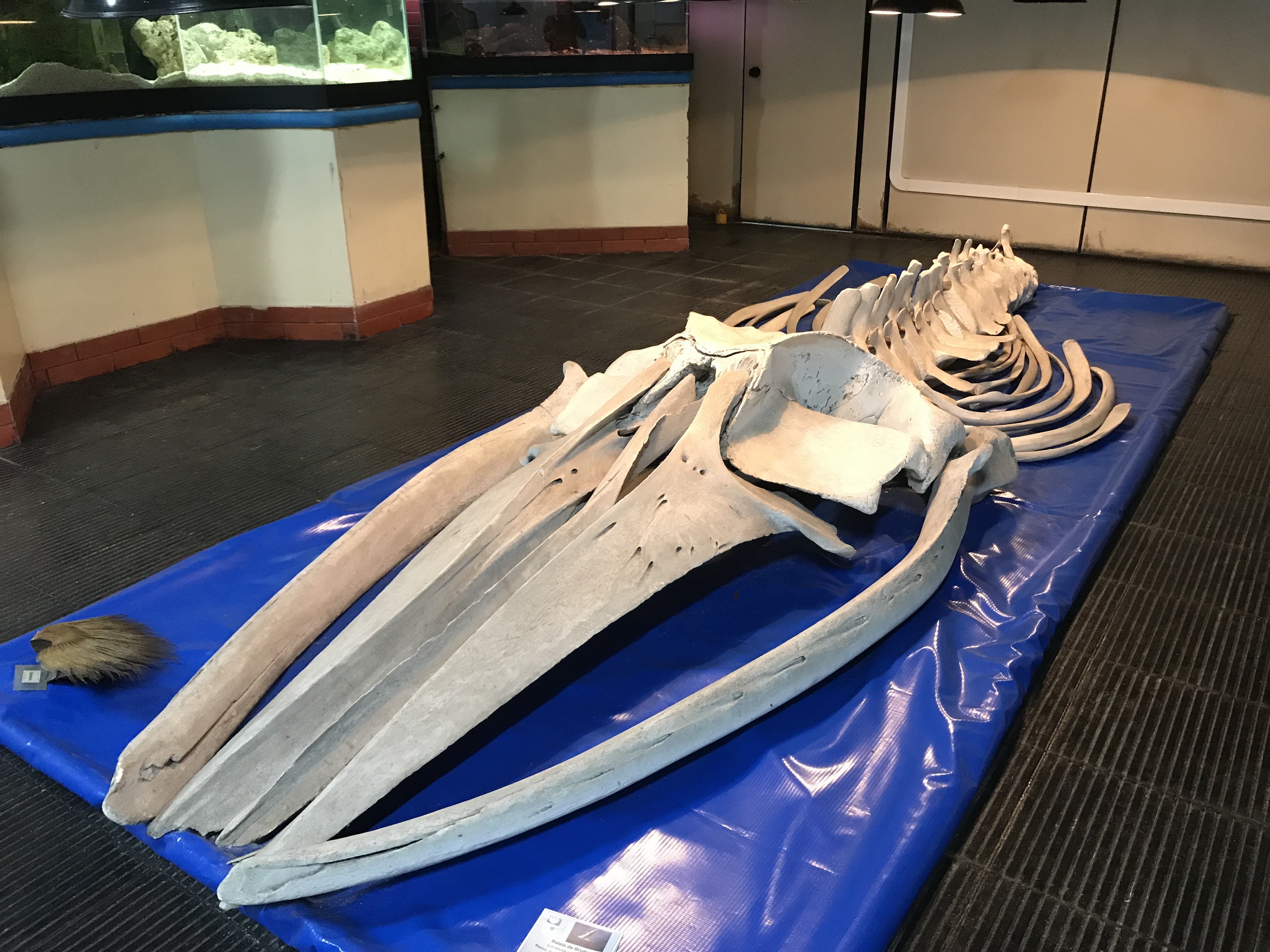 Esqueleto da baleia de Bryde, cerca de 15,5 metros de comprimento. No museu, é exposto apenas metade do esqueleto.